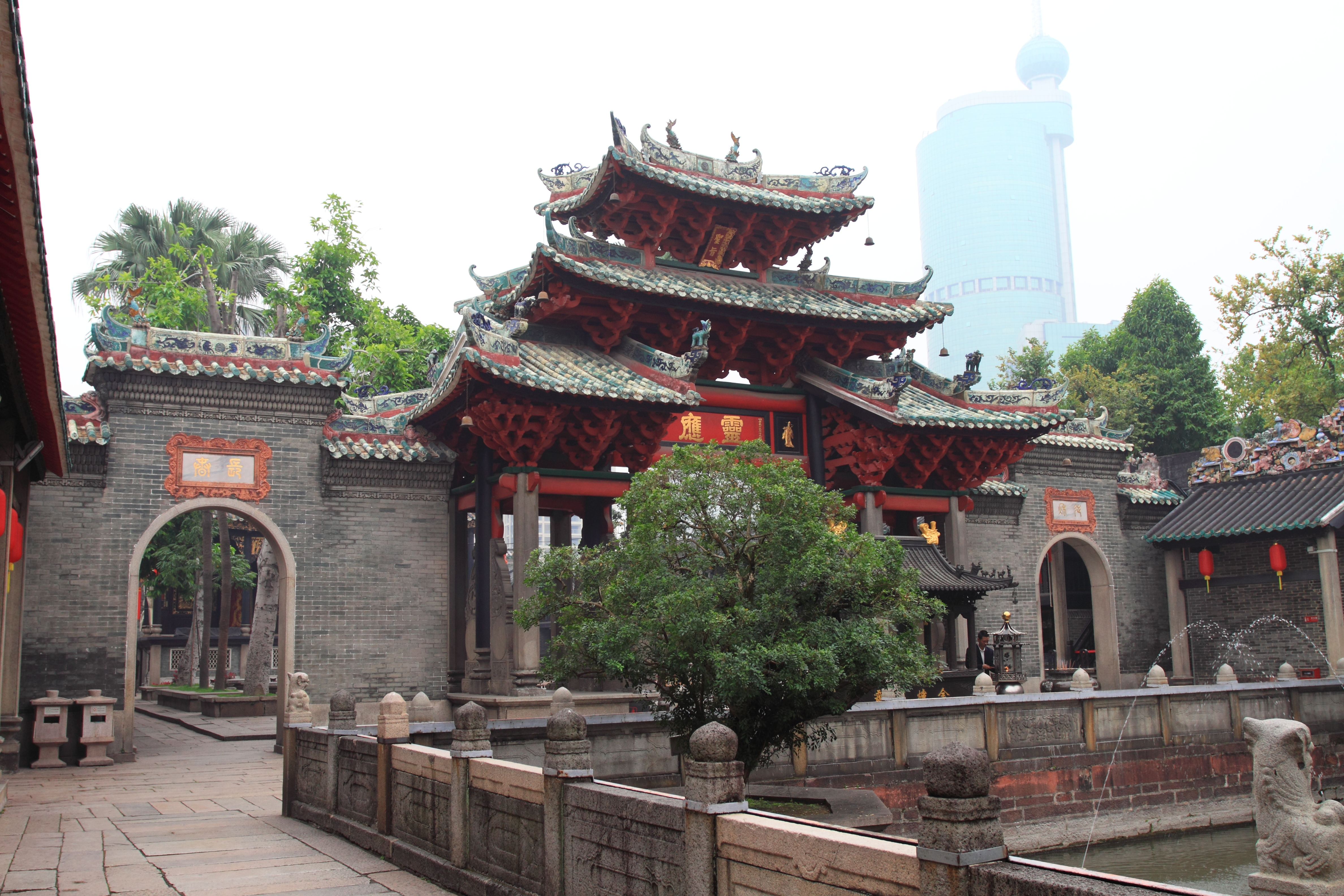 佛山祖庙